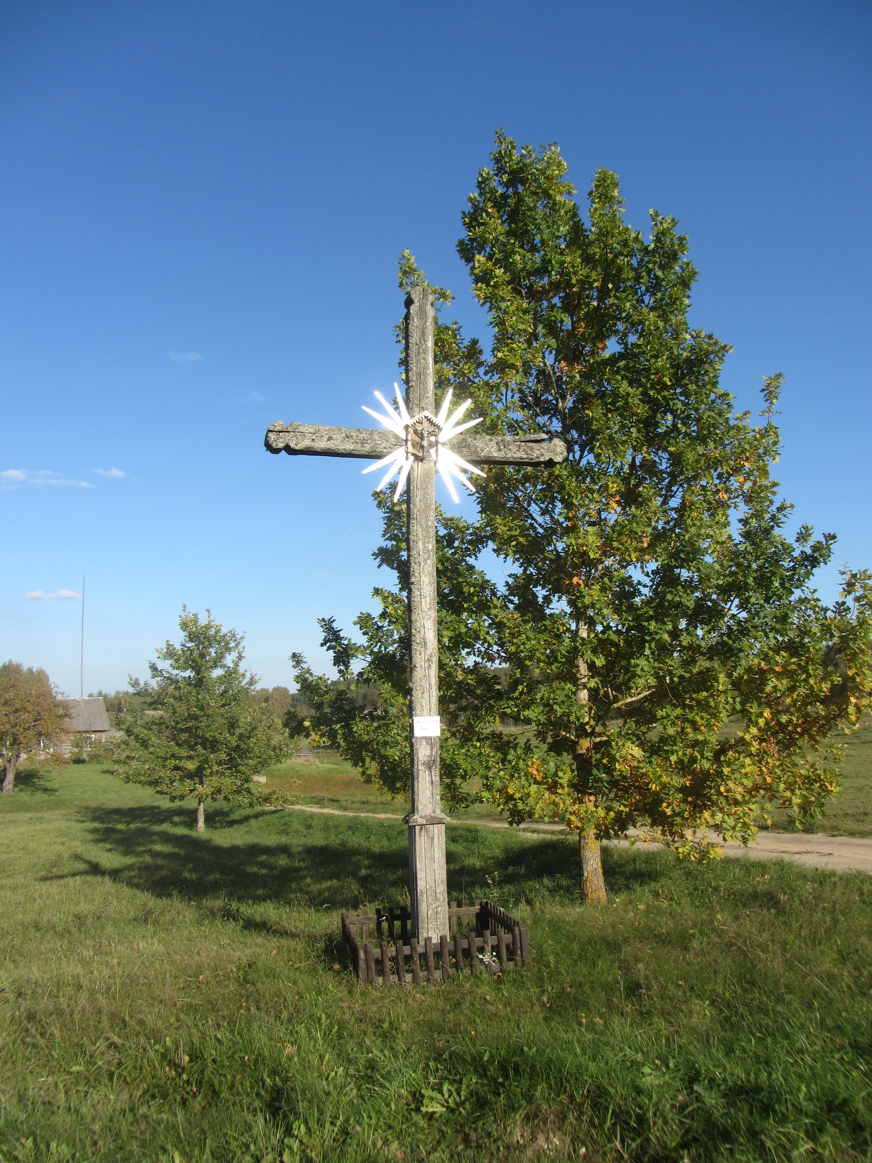 Saldutiškio sen., Lithuania